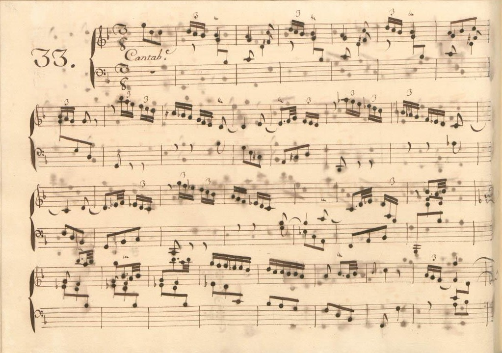 La sonate K. 546, telle qu'elle se présente dans le manuscrit de Parme, volume XV no. 33.